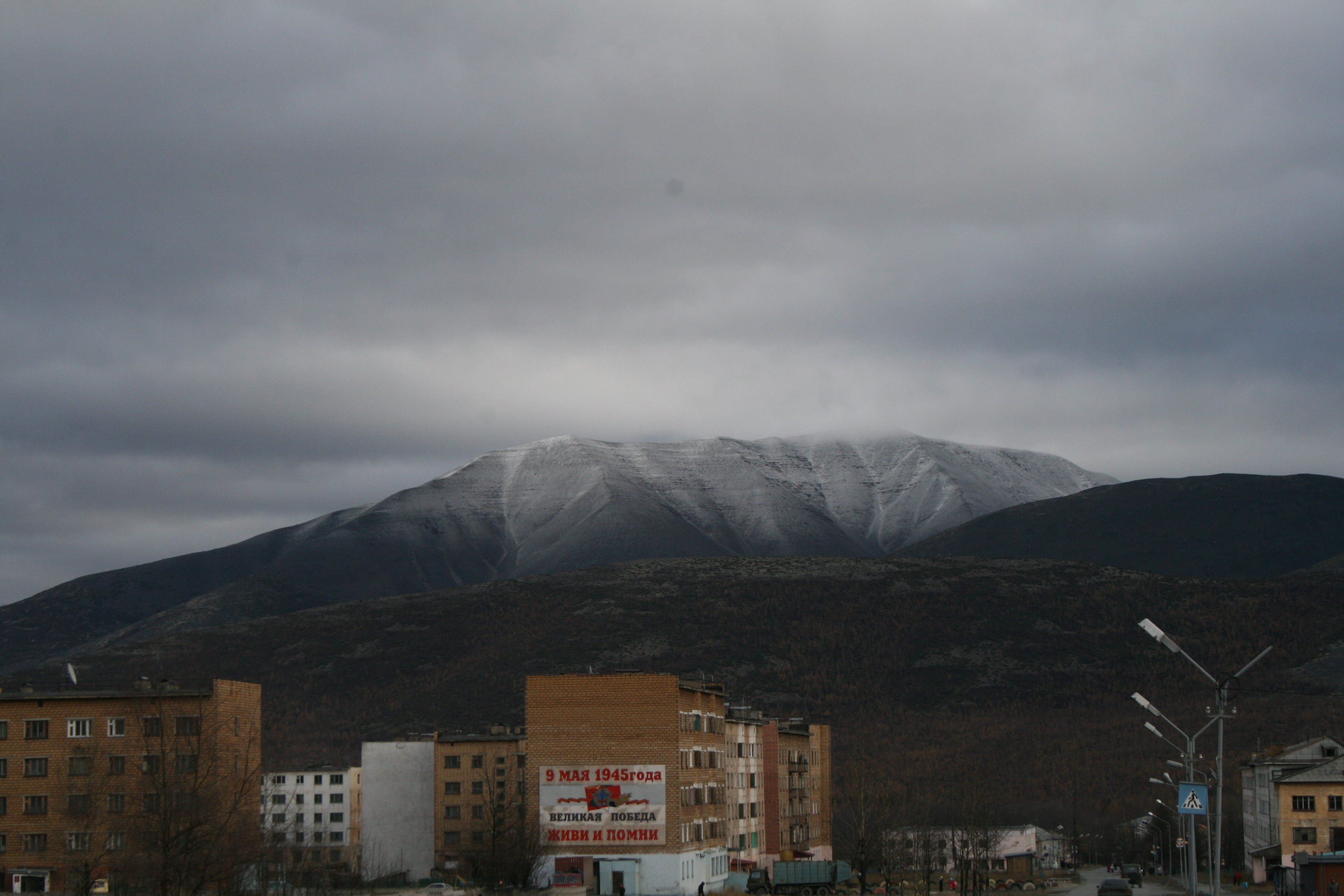 пос. Омсукчан, центральная улица